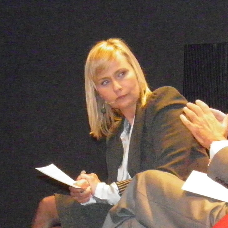 Jordi Pujol, Mònica Terribas i Miquel Roca.